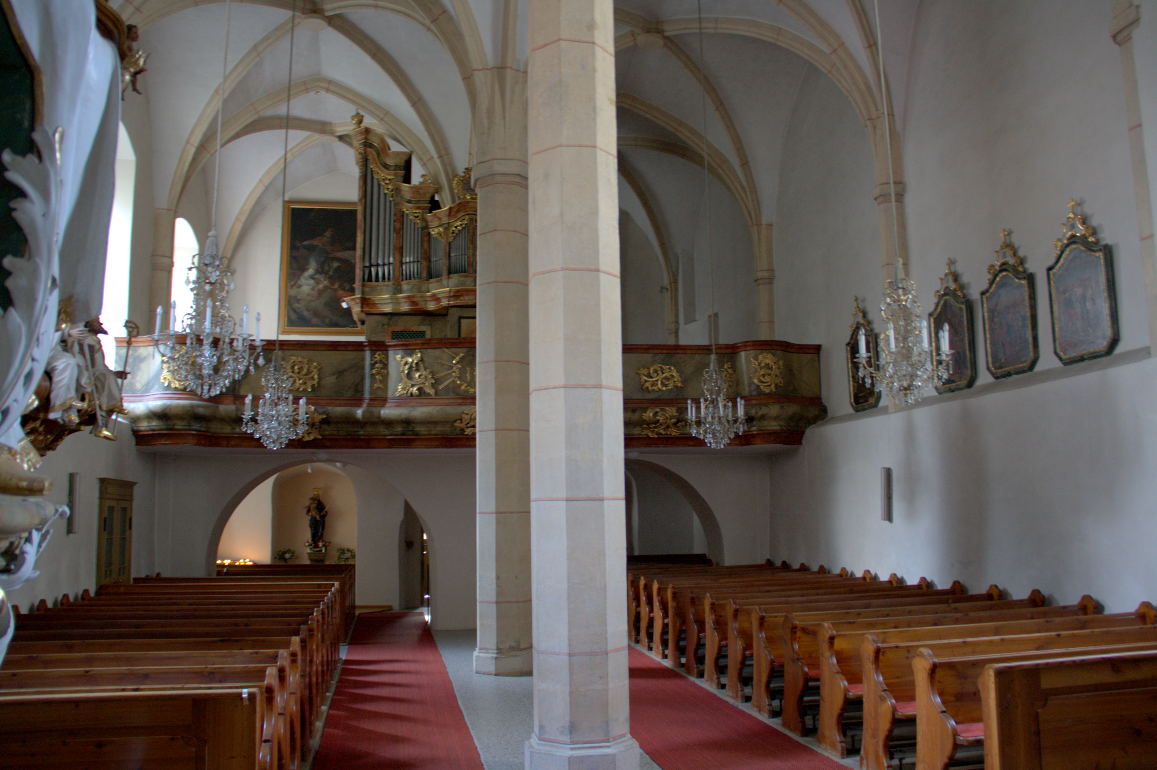 Kath. Pfarrkirche hl. Jakobus d. Ä., Innenansicht